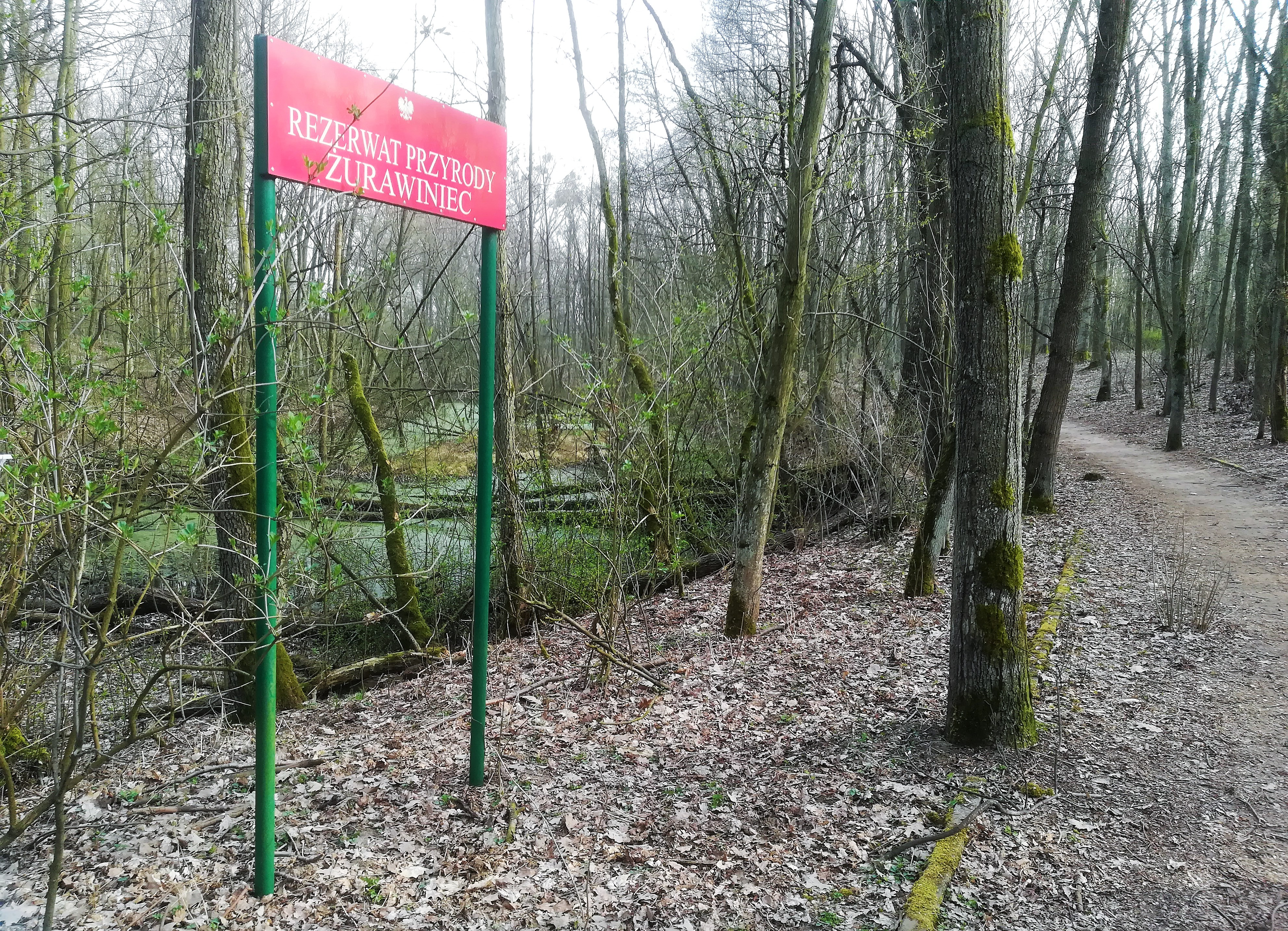 Rezerwat Żurawiniec w Poznaniu w 2018, po podniesieniu poziomu wód.